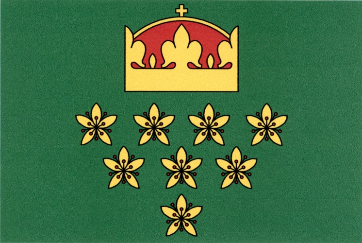 Vlajka, Dolní Hbity, okres Příbram